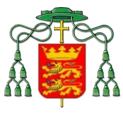 Wappen Eduard Graf O’Rourke 1876-1943 Administrator und Bischof von Danzig (1922-1938)